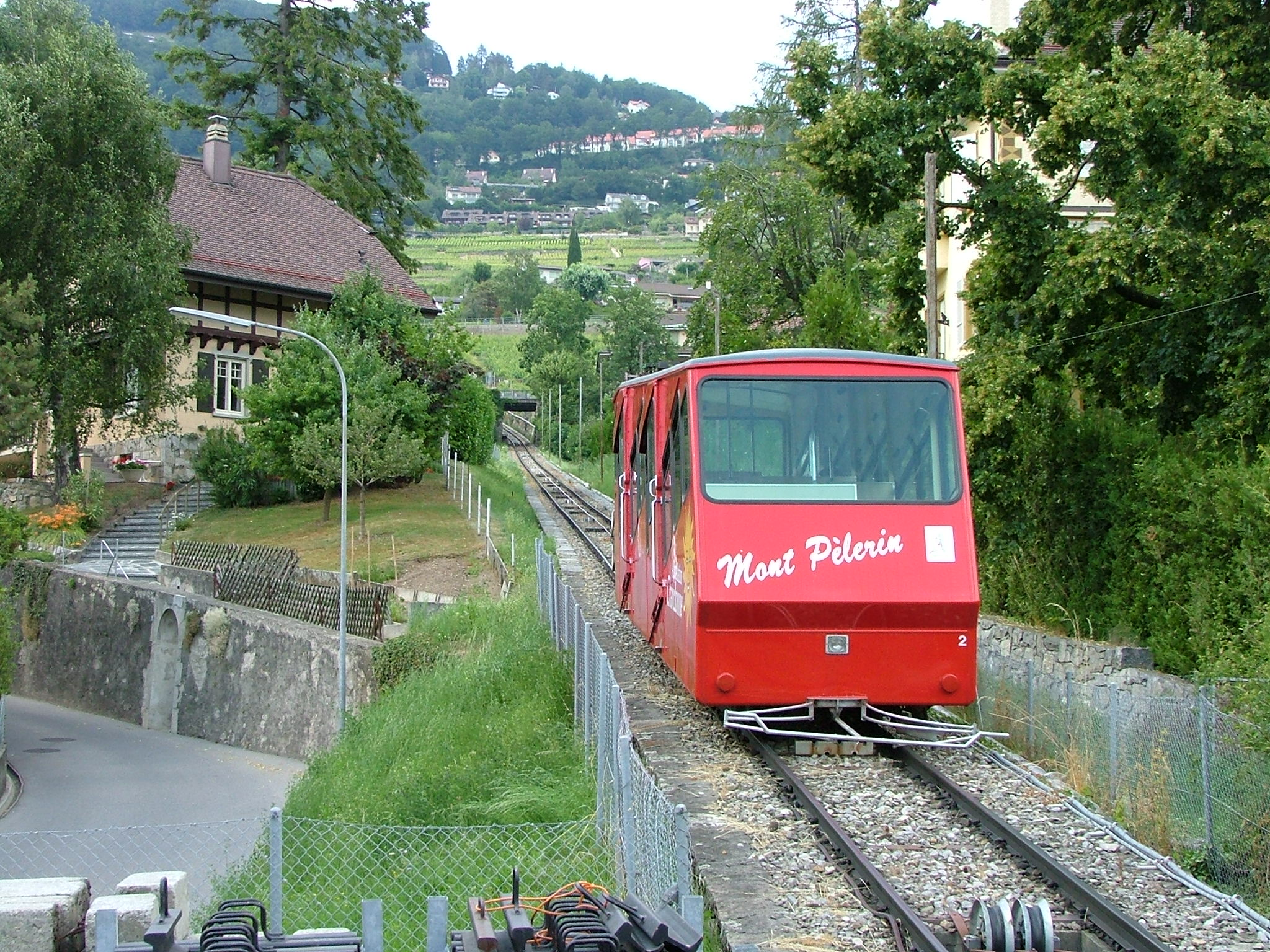 Kolej Vevey–Chardonne–Mont Pèlerin w 2006 roku.